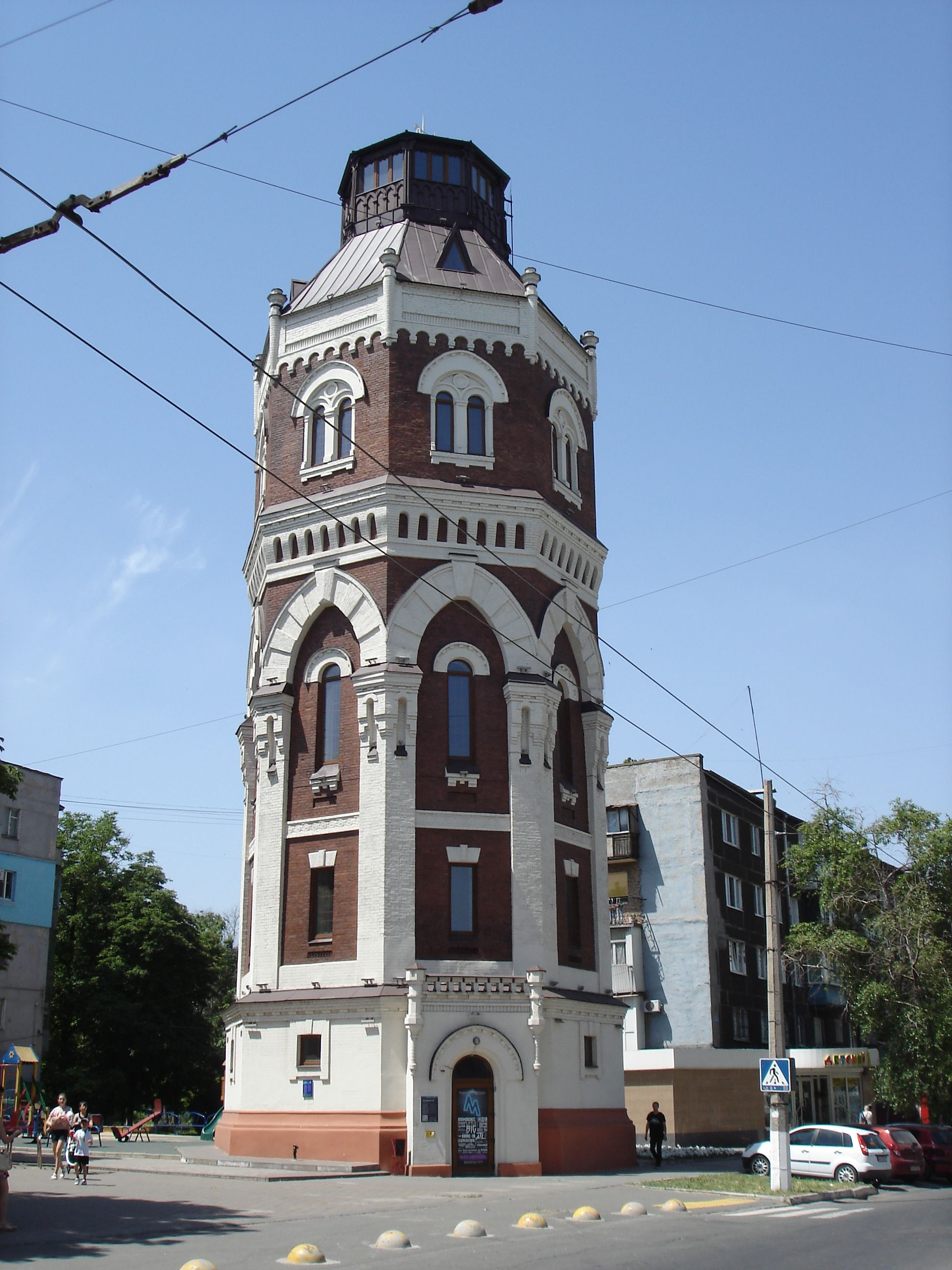 Водонапірна башта (мур.), Маріуполь, вул. Арх. Нільсена (Енгельса), 36